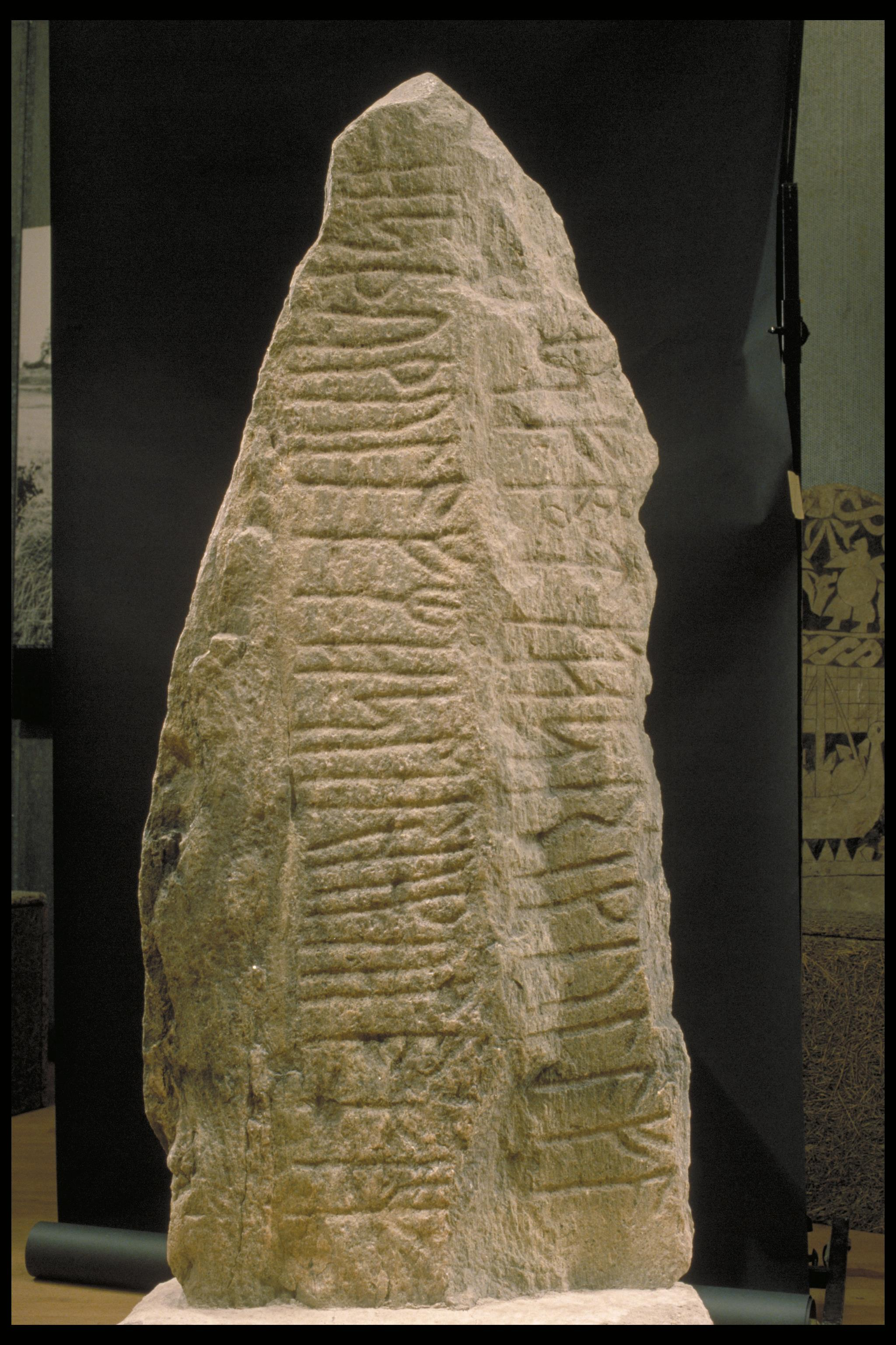 RAÄ-nummer Mjällby 51:1. Inskriften lyder: Hådulv, Hjorulvs ättling, ristade till minnet av Härjulv dessa runor. Motiv: Mjällby 51:1 Nyckelord: Runor Kategori: Runristning/runsten RAÄ-nummer Mjällby 51:1. Inskriften lyder: Hådulv, Hjorulvs ättling, ristade till minnet av Härjulv dessa runor. Mjällby 51:1.